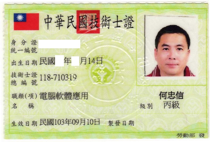 中華民國技術士證總編號118-710319，電腦軟體應用職類丙級技術士技能檢定合格。